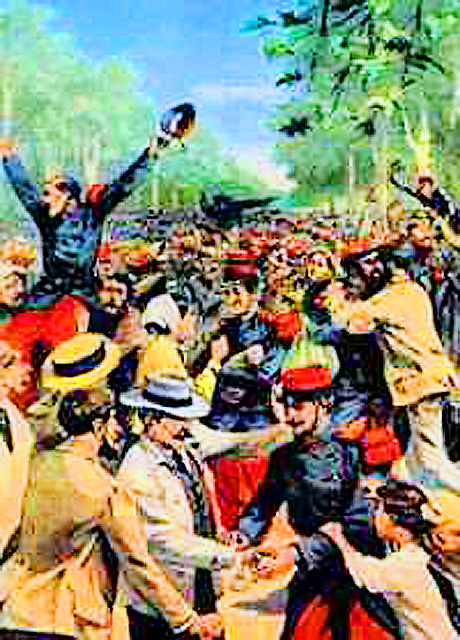 Représentation par Le Petit Parisien de la fraternisation entre le 17e et les Bittérois